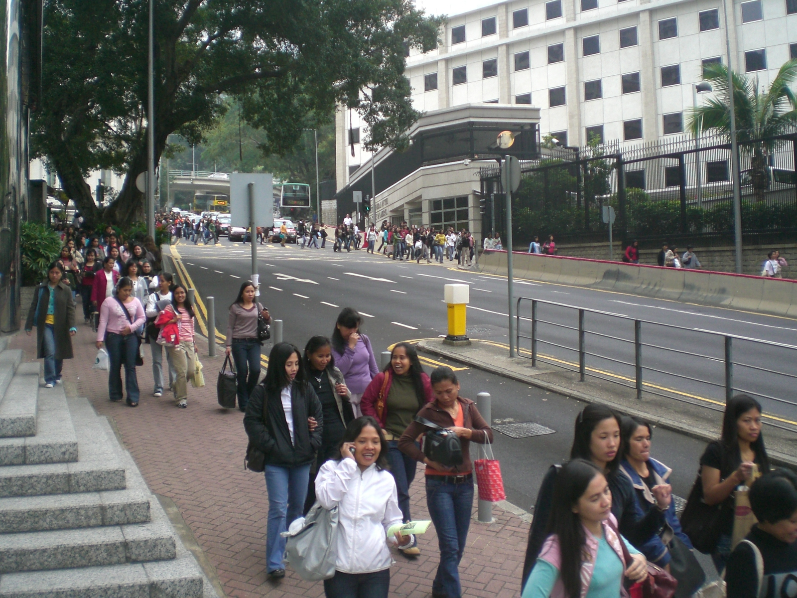 香港島花園道37號聖若翰堂